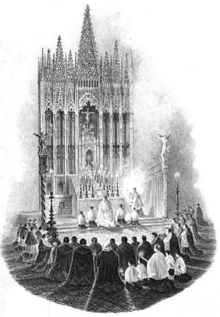 Ilustración del Altar Mayor de la Catedral de Barcelona (1839)